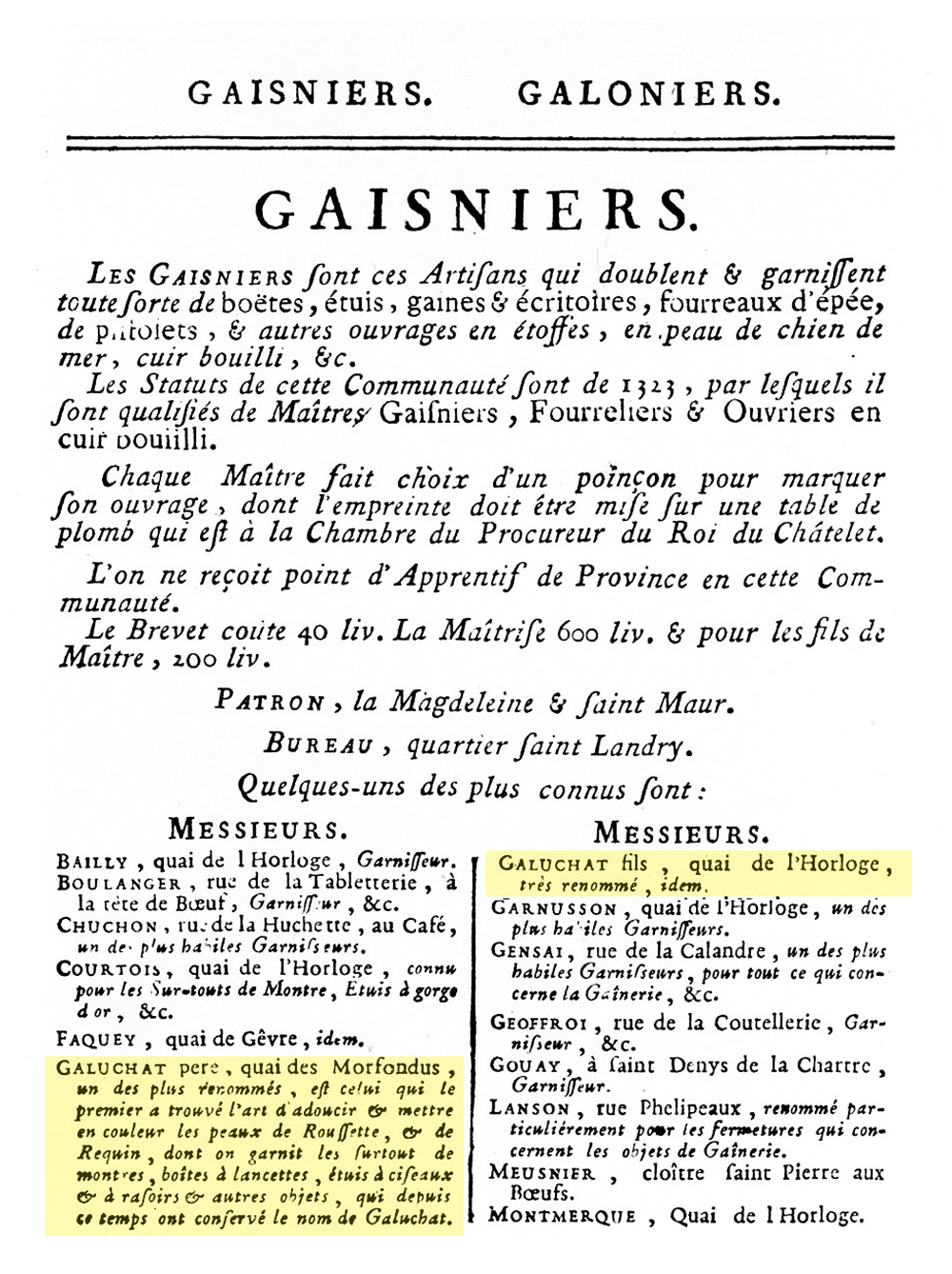 Almanach d'Indication des Six Corps de Métiers de 1769. Bibliothèque Nationale.